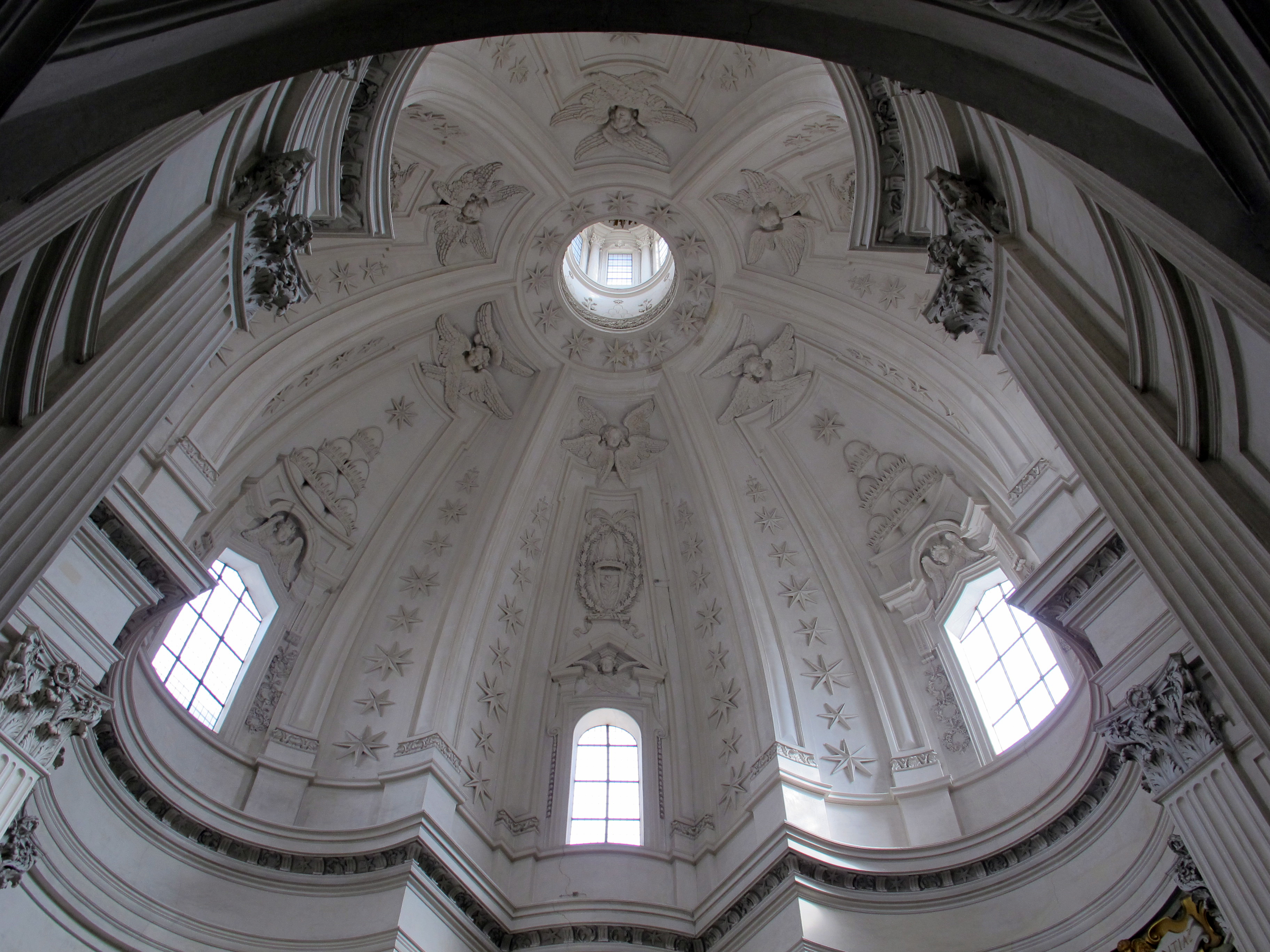 Sant'ivo alla sapienza, interno, cupola